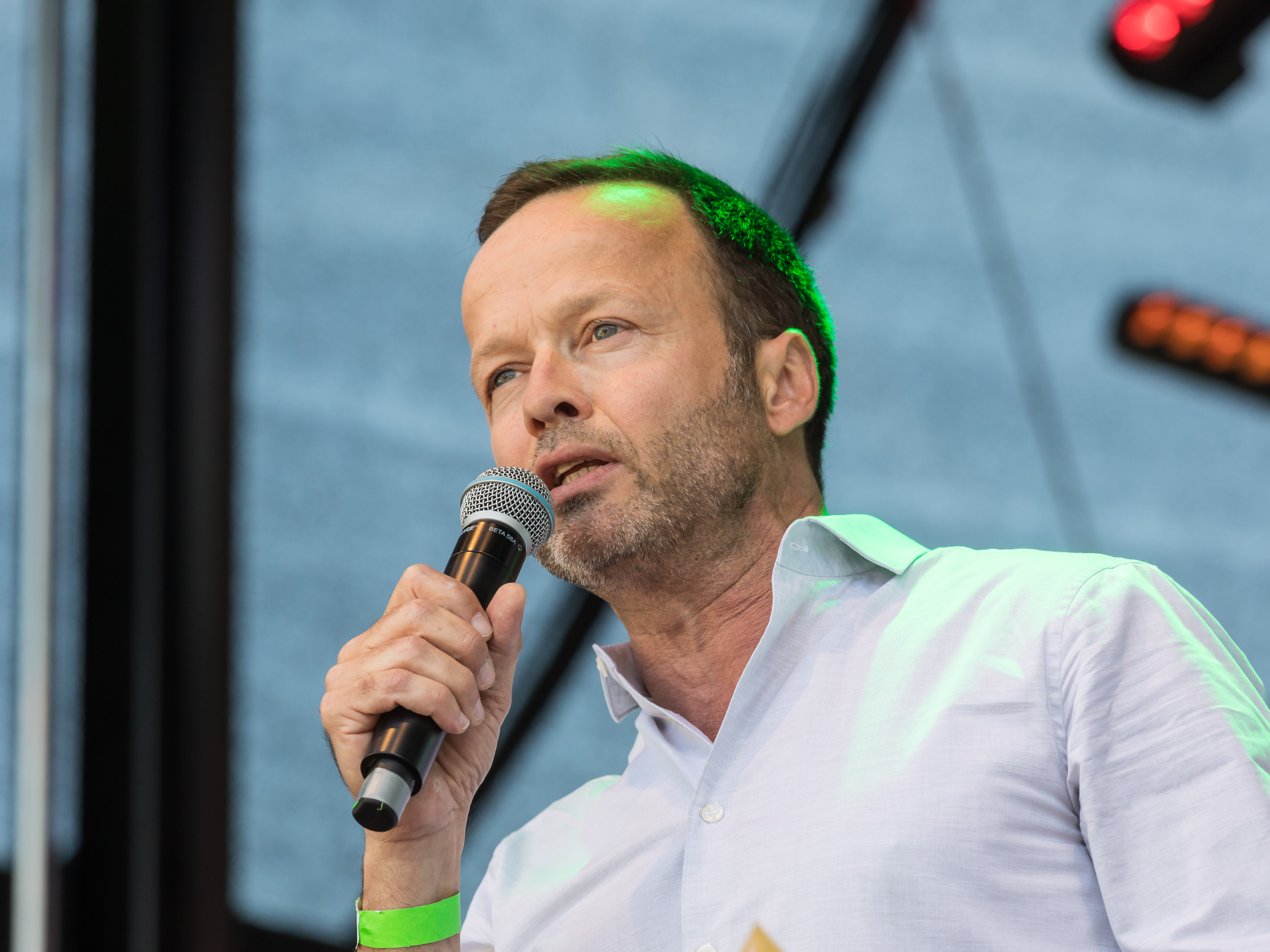 ColognePride/CSD 2018 - Verleihung des Felix-Rexhausen-Preises durch den Bund Lesbischer und Schwuler JournalistInnen Foto: Moderator Georg Restle